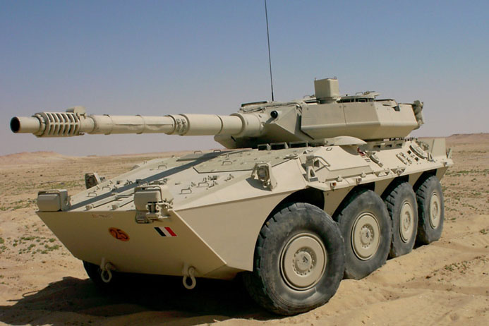 Autoblindo Italiano Centauro fotografato in zona desertica. Foto proveniente dal sito Sito Ufficiale dell'Esercito Italiano, Autorizzazione.